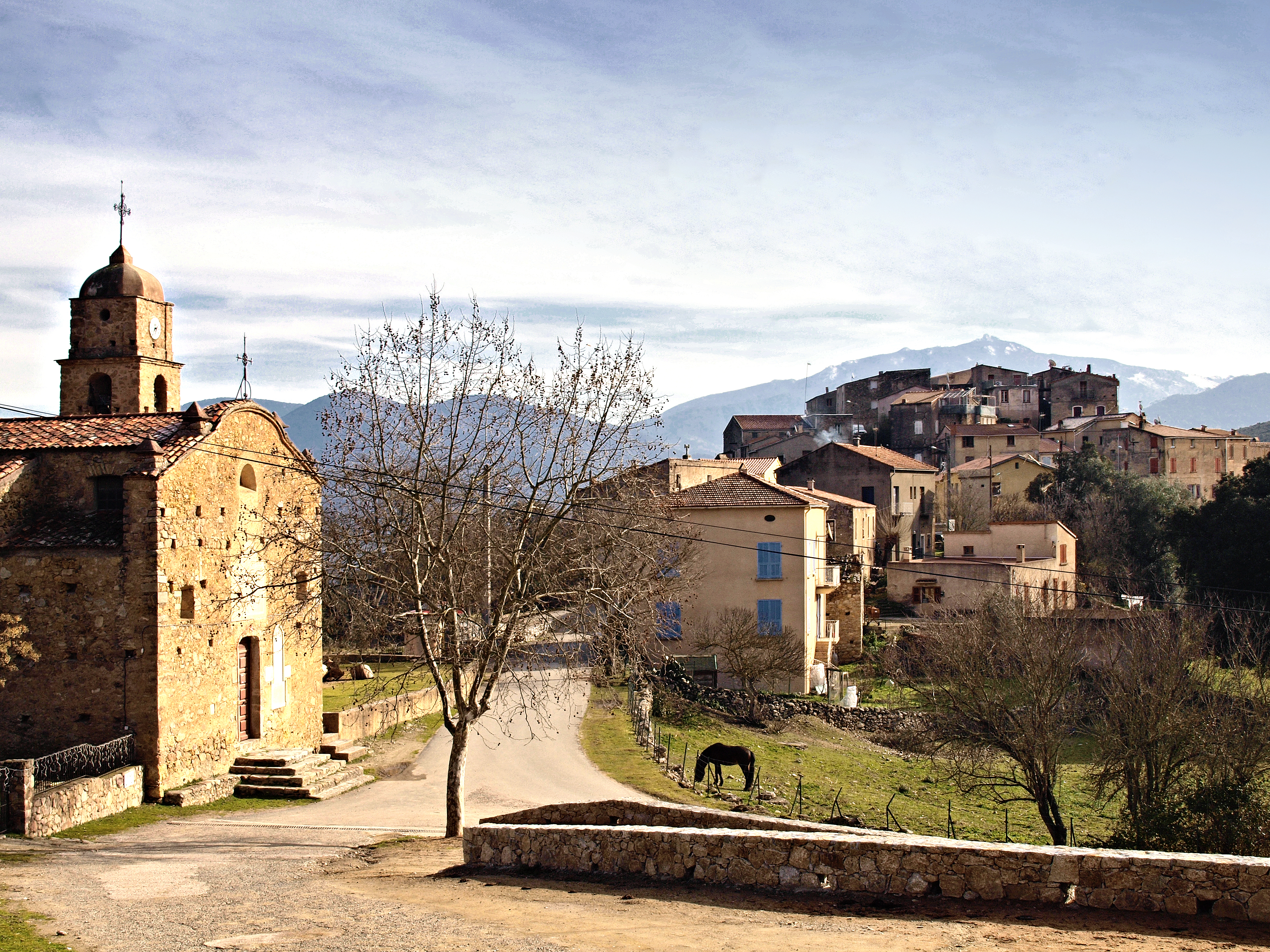 Piedigriggio (Haute-Corse) - Le village et son église paroissiale Saint-Michel